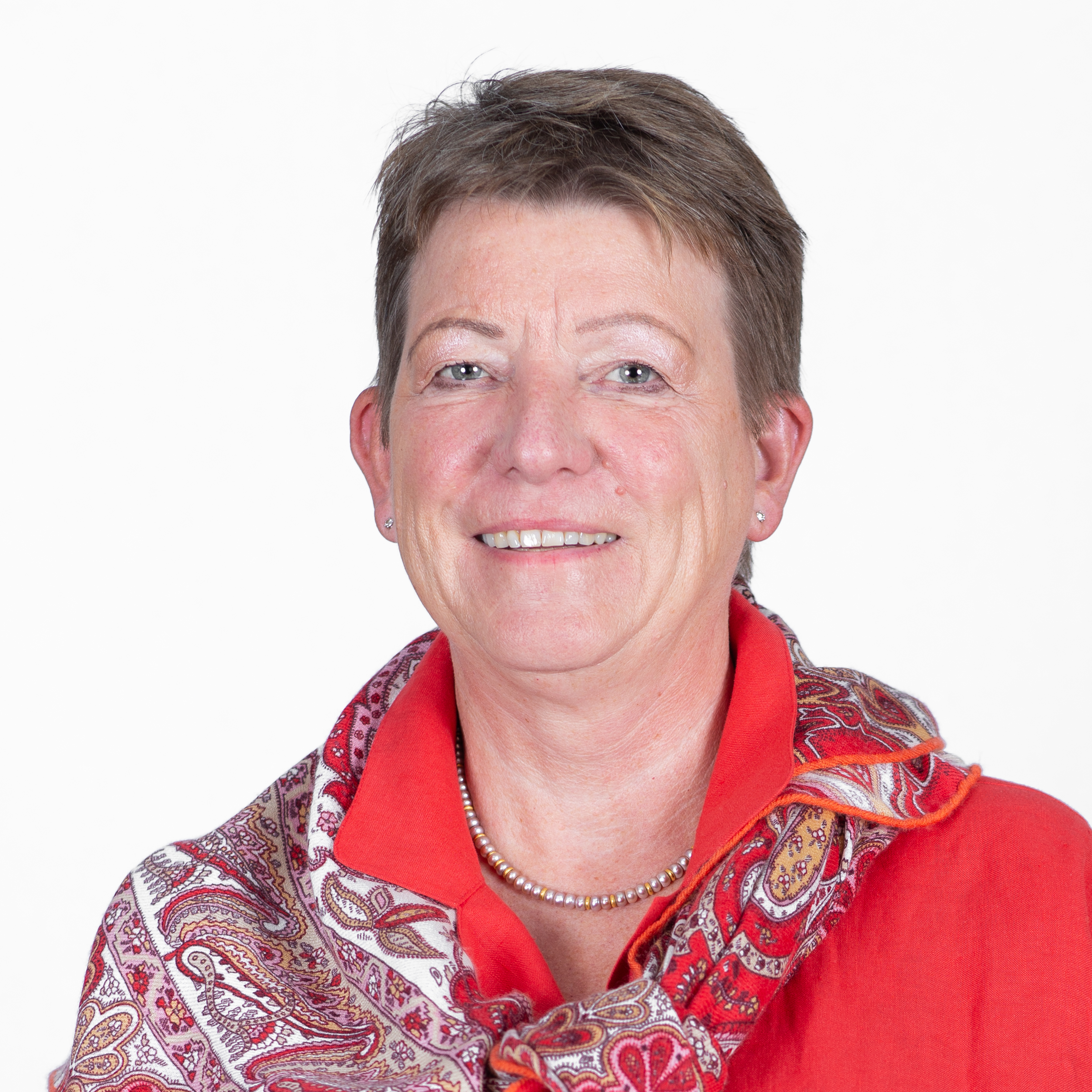 Claudia Dalbert, MdL Sachsen-Anhalt, B90/Grüne